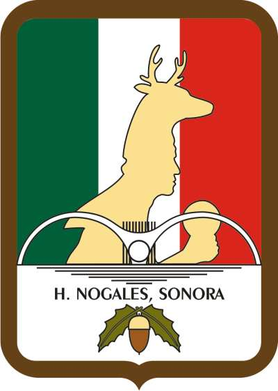 Si necesitas El Escudo a lineas contactame y con gusto lo proporcionare.